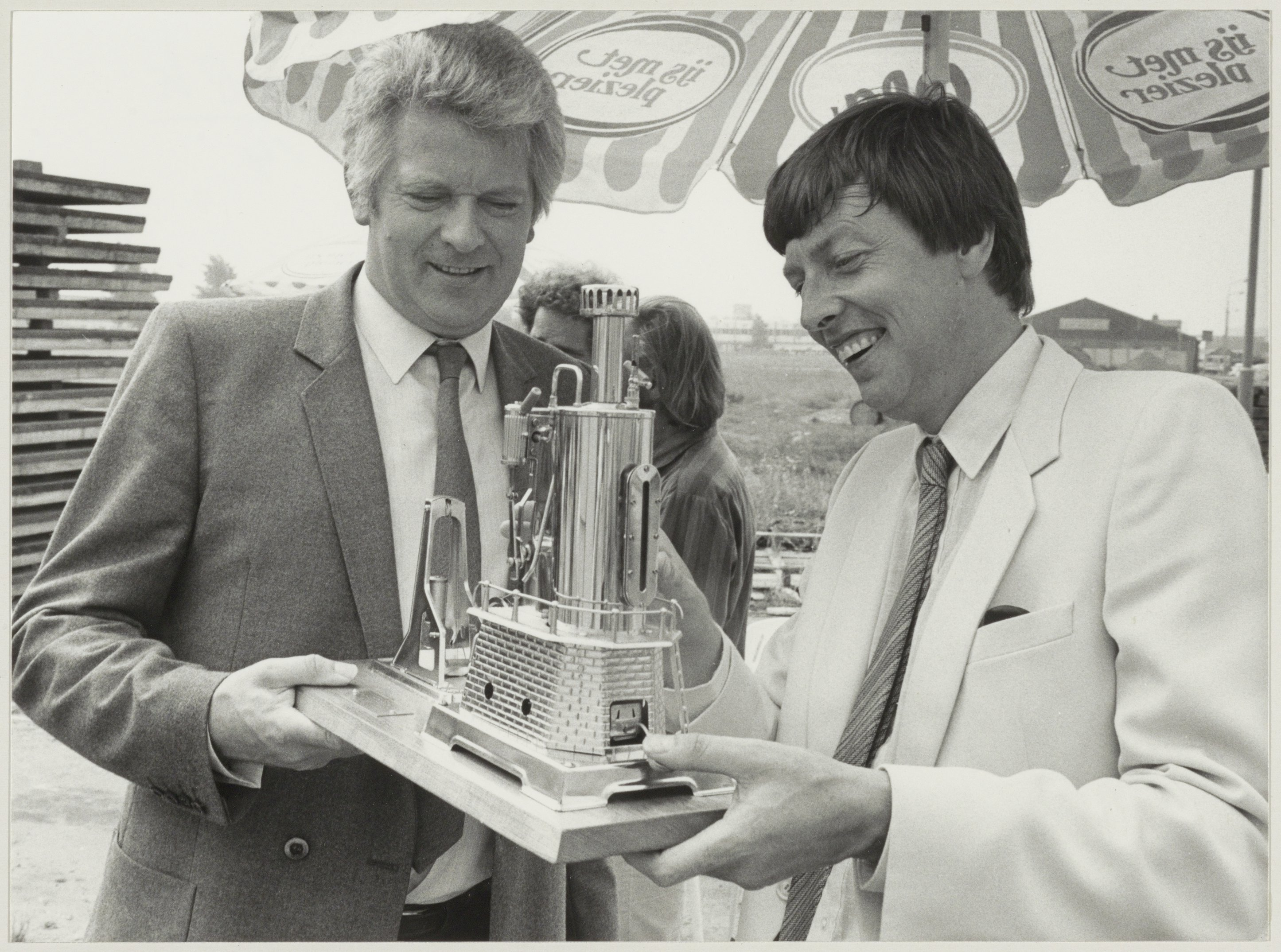 CollectieCollectie Fotoburo de BoerInventarisnummerNL-HlmNHA_54012255NL-HlmNHA_1478_21018KBeschrijvingWethouder Paul Captijn (r) en CBS directeur Peter Bouwens bij het heien van de eerste paal.FotonummerNL-HlmNHA_1478_4377DocumenttypePortrettenVervaardigerBoer, Cees de (1918-1985) Soort vervaardigerFotograaf AnnotatiesHD.060881PersonenCaptijn, PaulBouwens, Peter LandNederland ProvincieNoord-Holland GemeenteHaarlem PlaatsHaarlem StraatConradweg GeografischWaarderpolder Begindatum08-1981Einddatum08-1981TechniekFoto TrefwoordenPersonen, Bedrijven